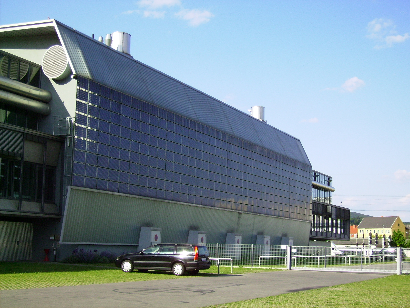 Photovoltaikmodule (Solarzellen) an der Fassade der Helmut-List-Halle in Graz